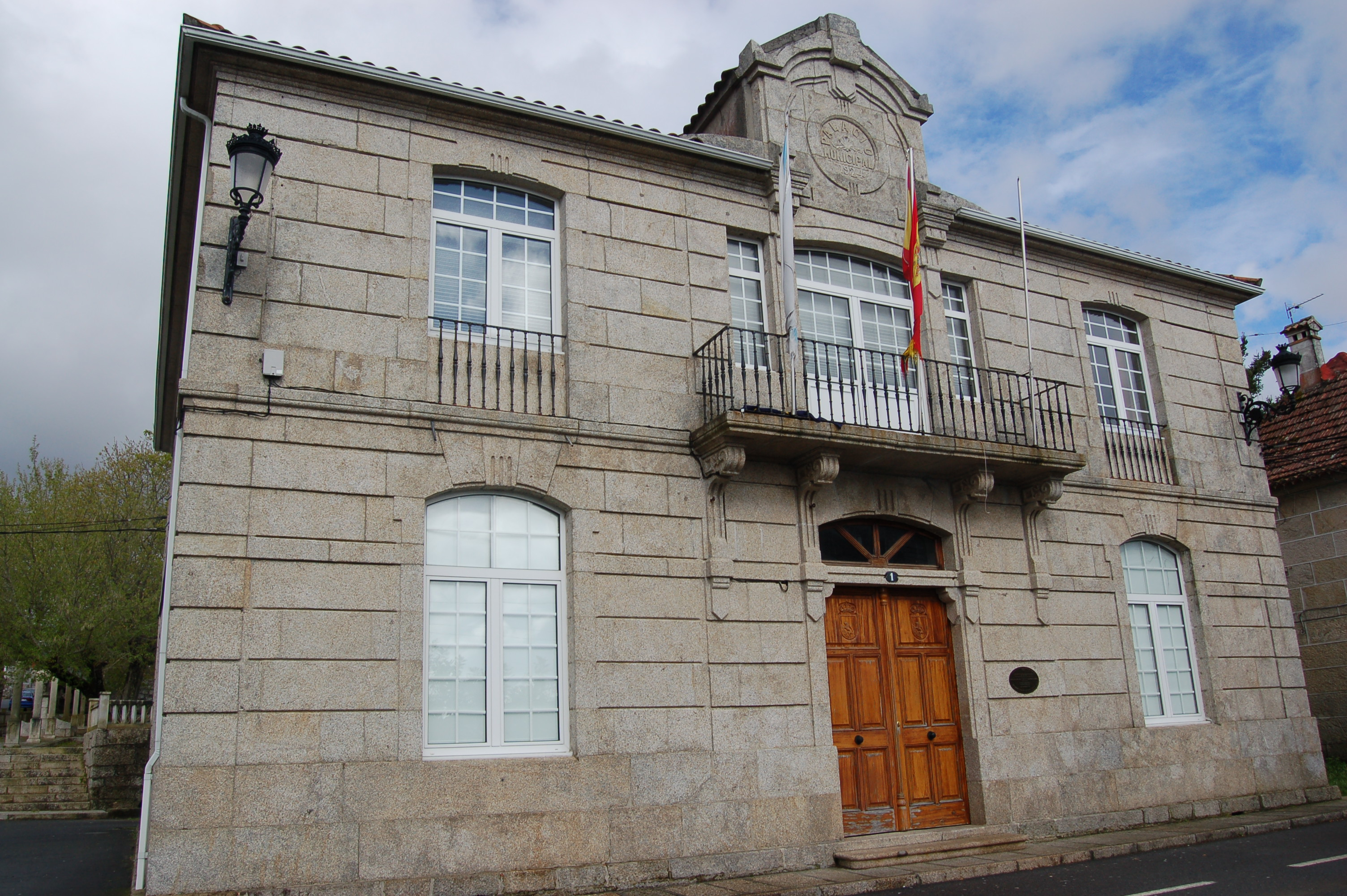 Casa consistorial da Lama